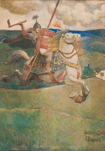 Шаврин Фёдор Владимирович (1880-1915)/ «Богатырь Дон», начало ХХ в. бумага на картоне; 63х45,5